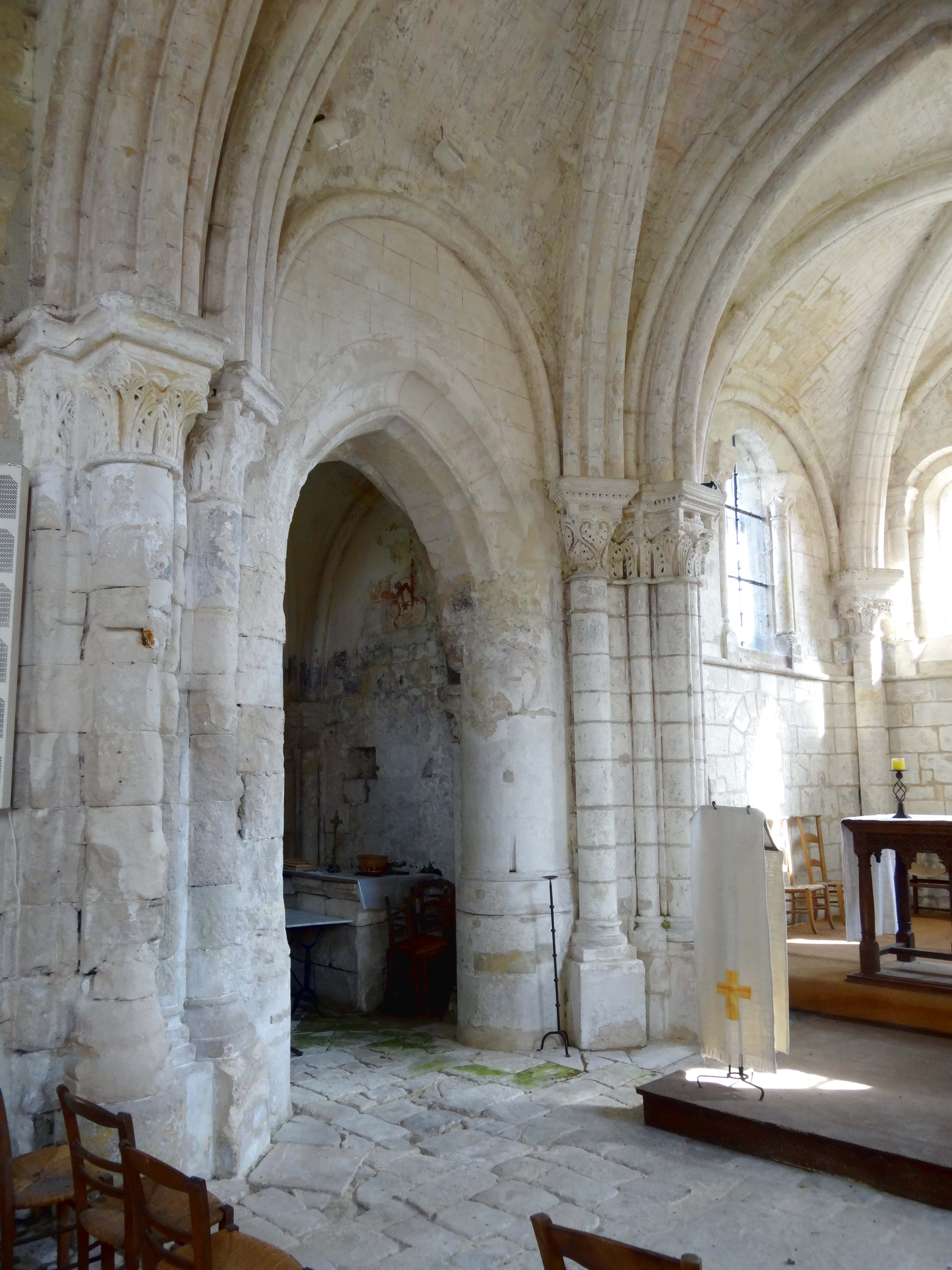 Intérieur de l'église - voir titre.